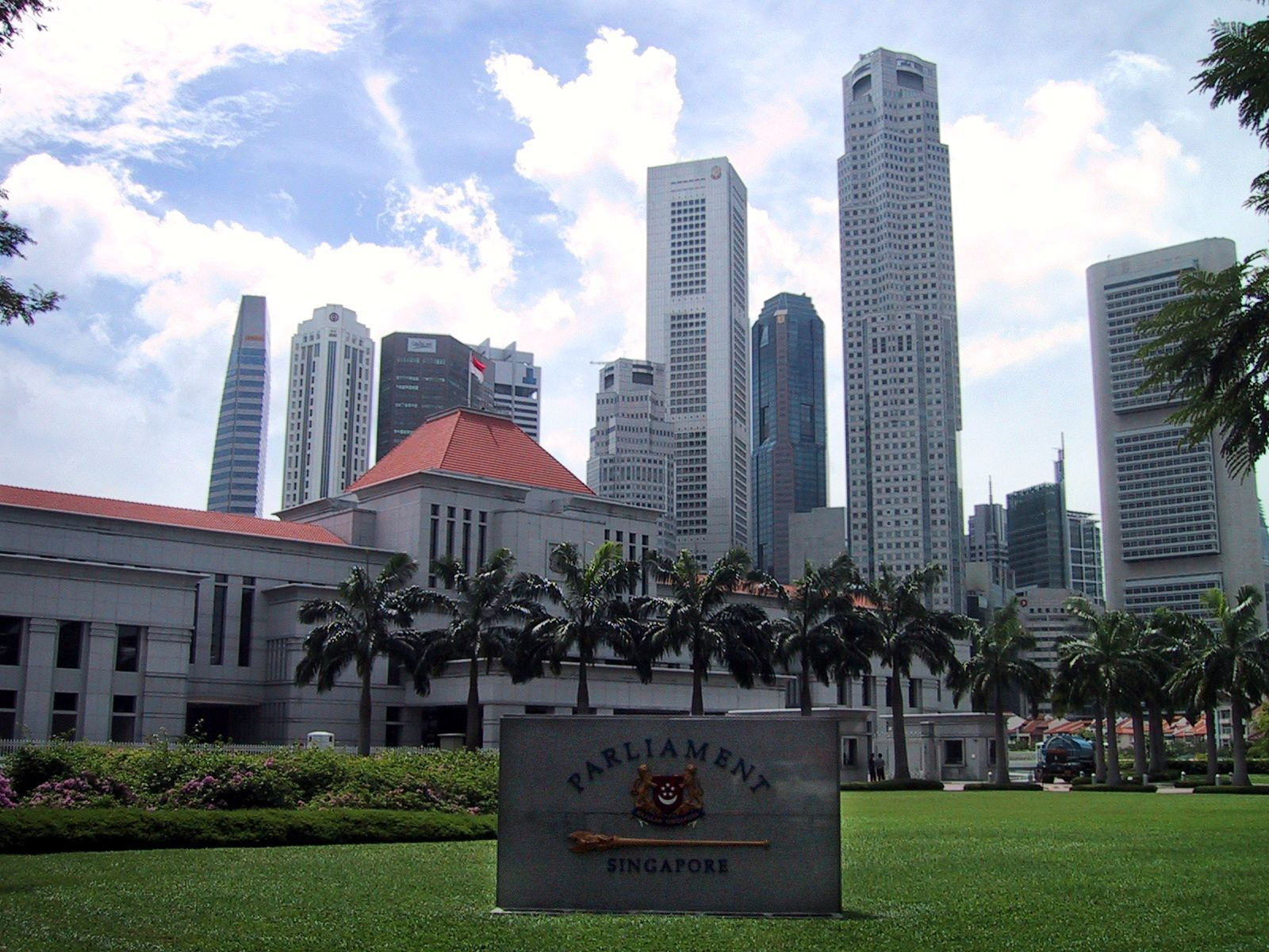 Singapore Skyline